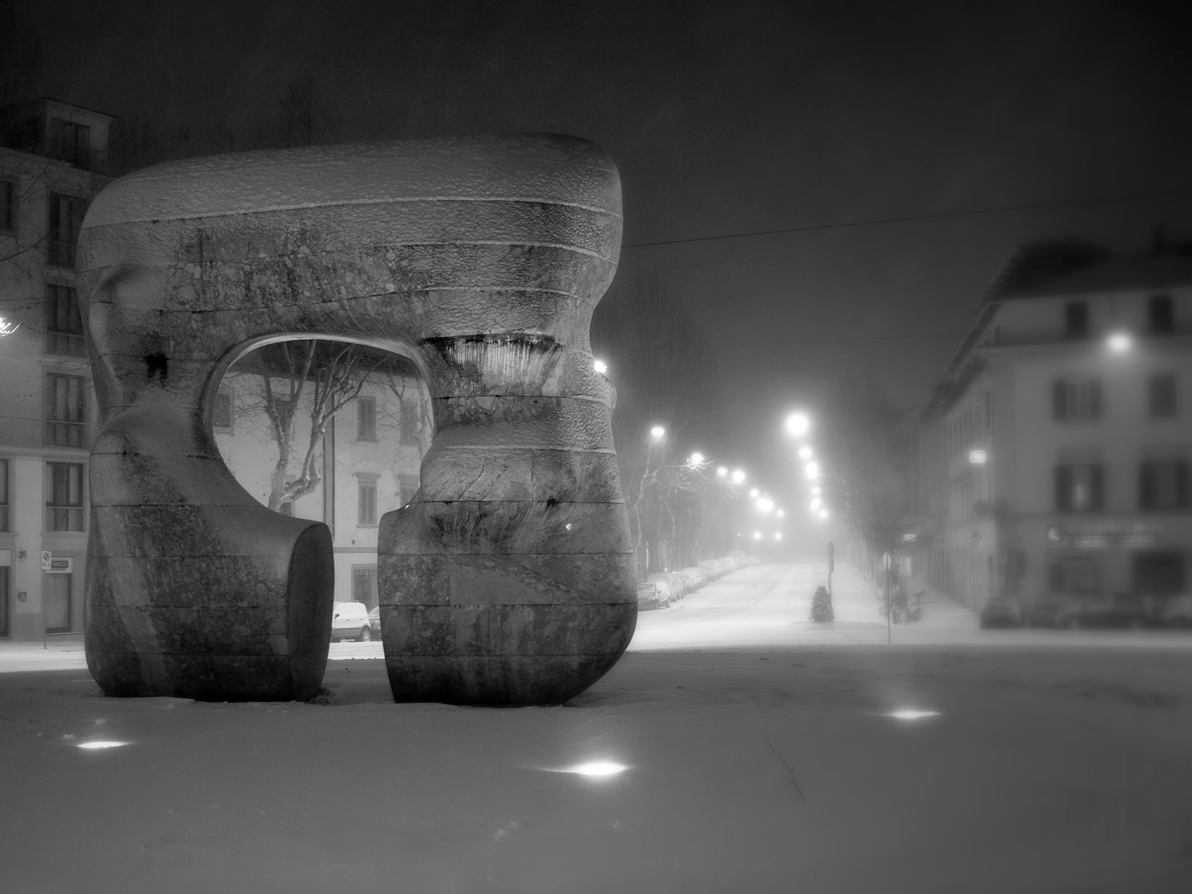 Statua di Henry Moore (Forma squadrata con taglio) This is a photo of a monument which is part of cultural heritage of Italy.